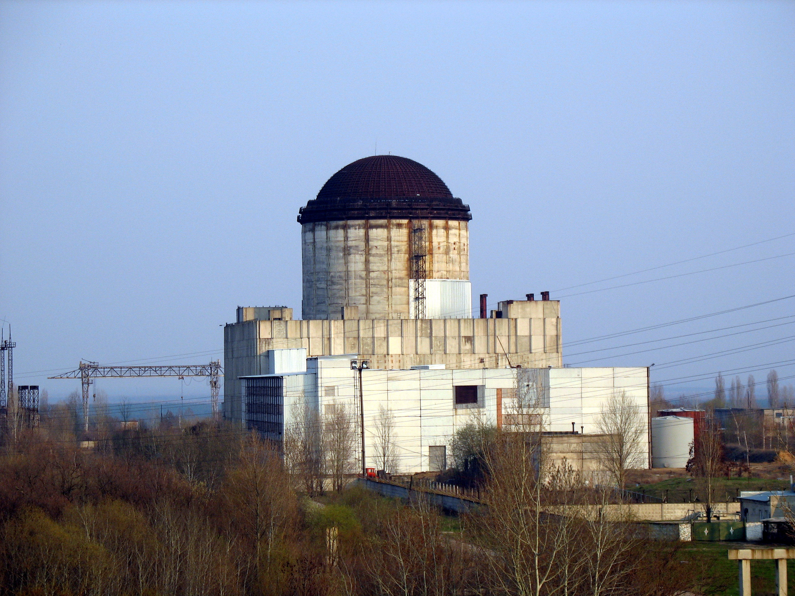 Воронежская АСТ